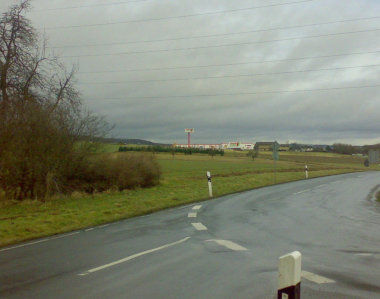 Werbepylon, Usingen